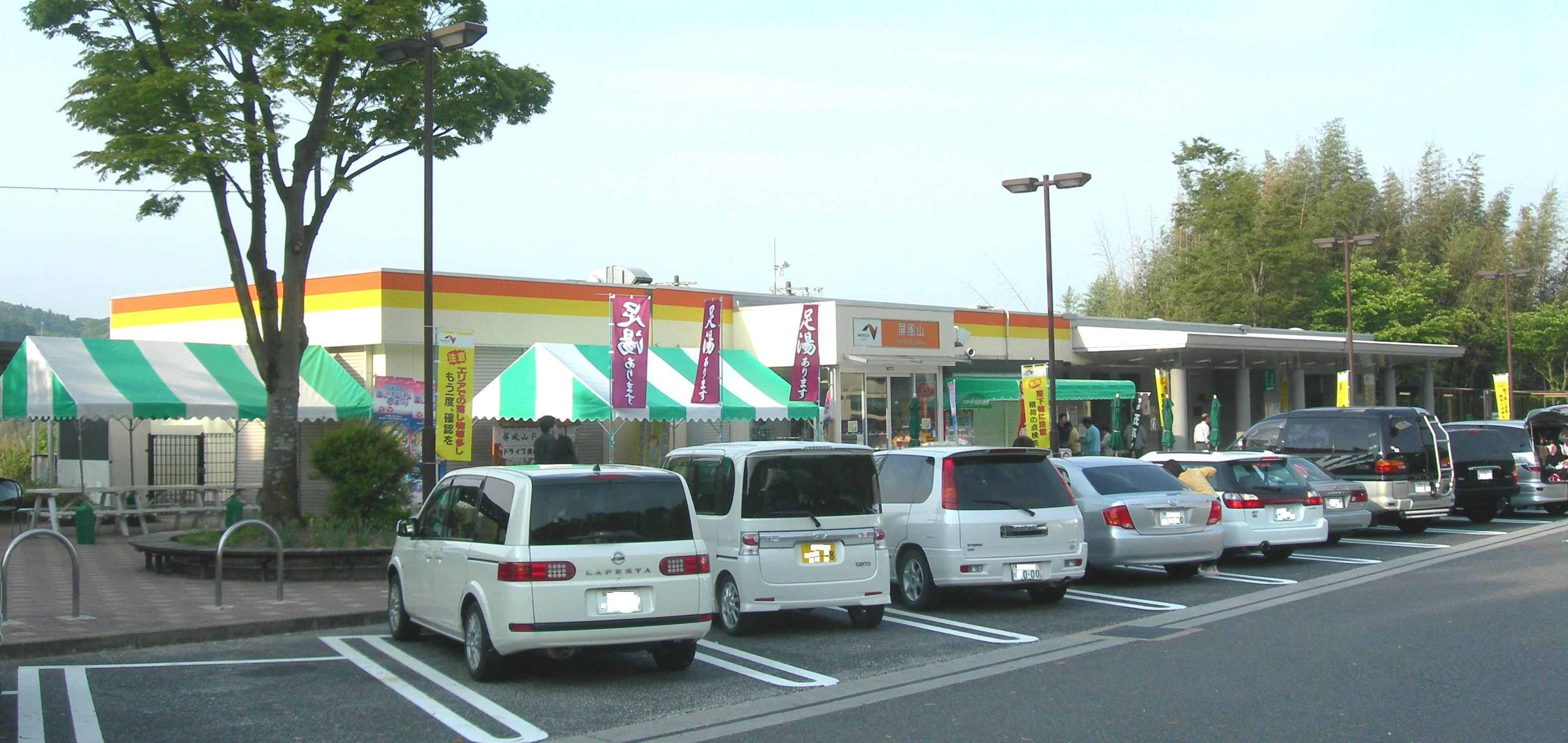 屏風山パーキングエリア 下り線施設